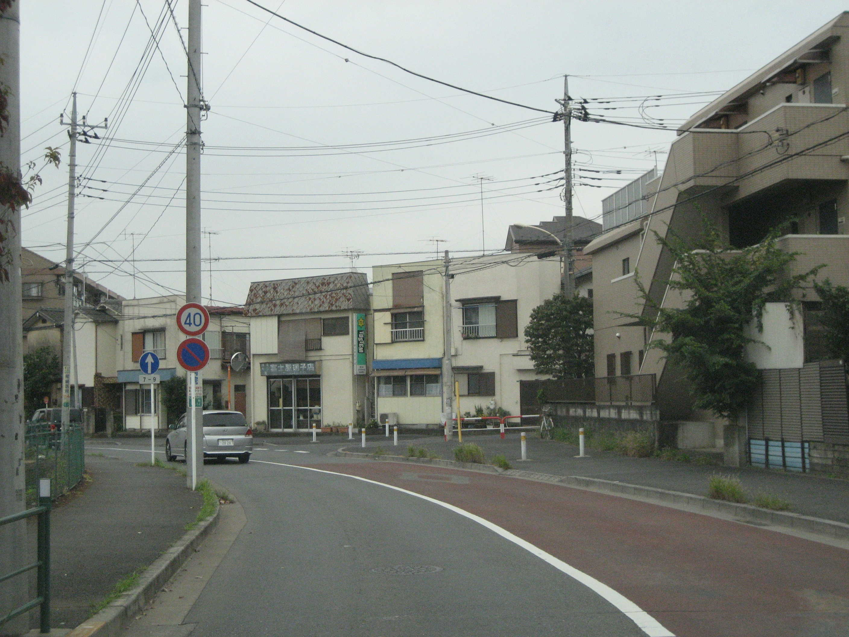 埼玉県道234号線、埼玉県新座市と東京都との境